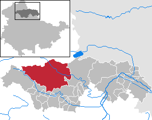 Sondershausen in Thuringia - Kyffhäuserkreis